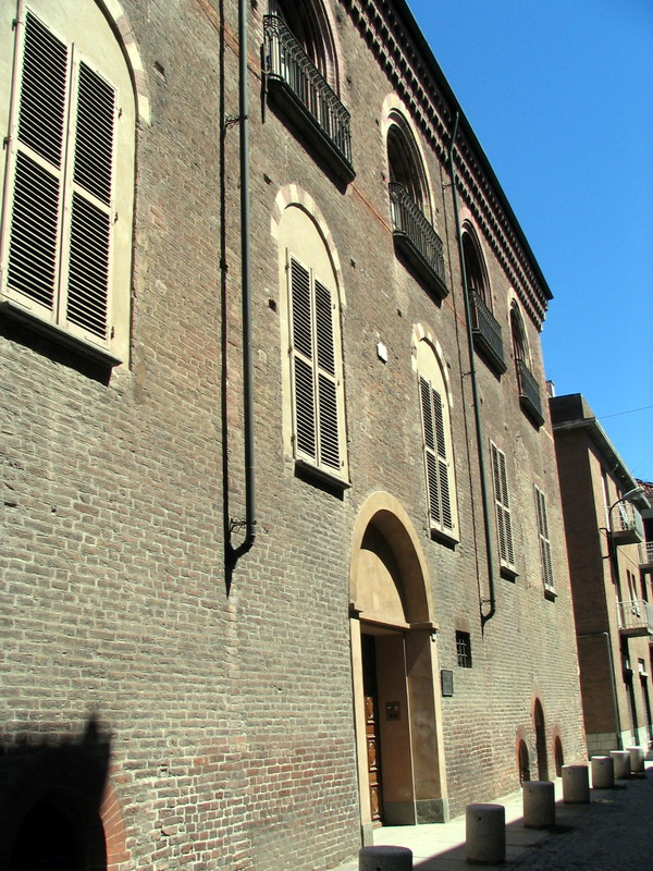 Asti Palazzo Zoya , foto fatta da me Faberh 2006.